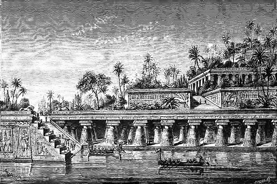 Les Jardins de Babylone, selon gravure du XIXè siècle